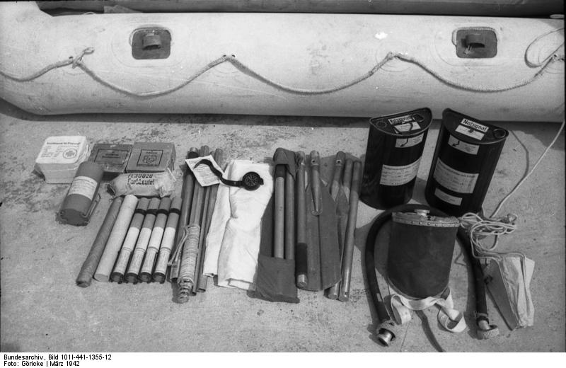 29.3.1942 Was sich alles in einem Schlauchboot befindet